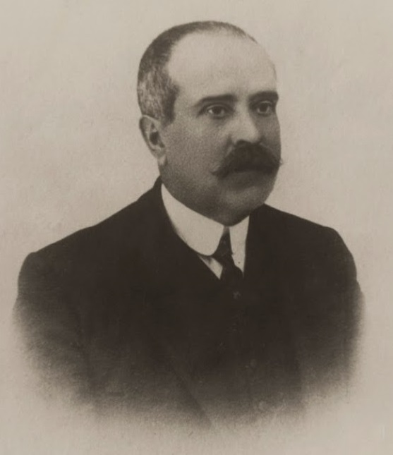 Joaquín Velasco Rodríguez de Vera